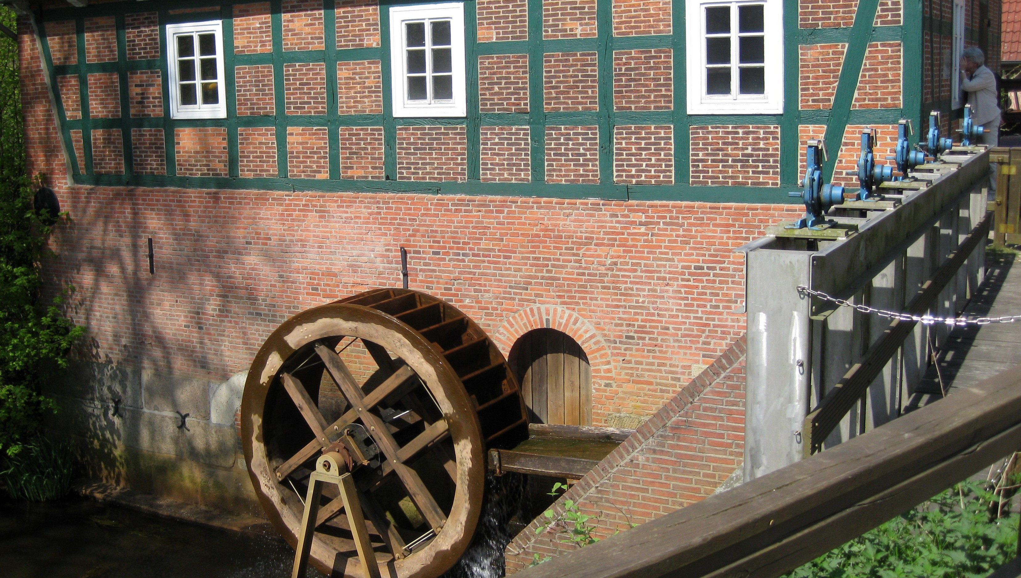 Mühle in Meyenburg (bei Schwandewede)